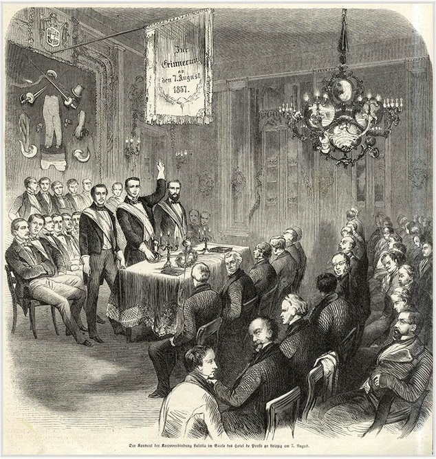 Convent des Corps Lusatia im Hotel de Prusse in Leipzig am 7. August 1857 (Erinnerungsblatt an das 50. Stiftungsfest in der Leipziger Illustr. Zeitung; zeitgenössischer Holzschnitt)